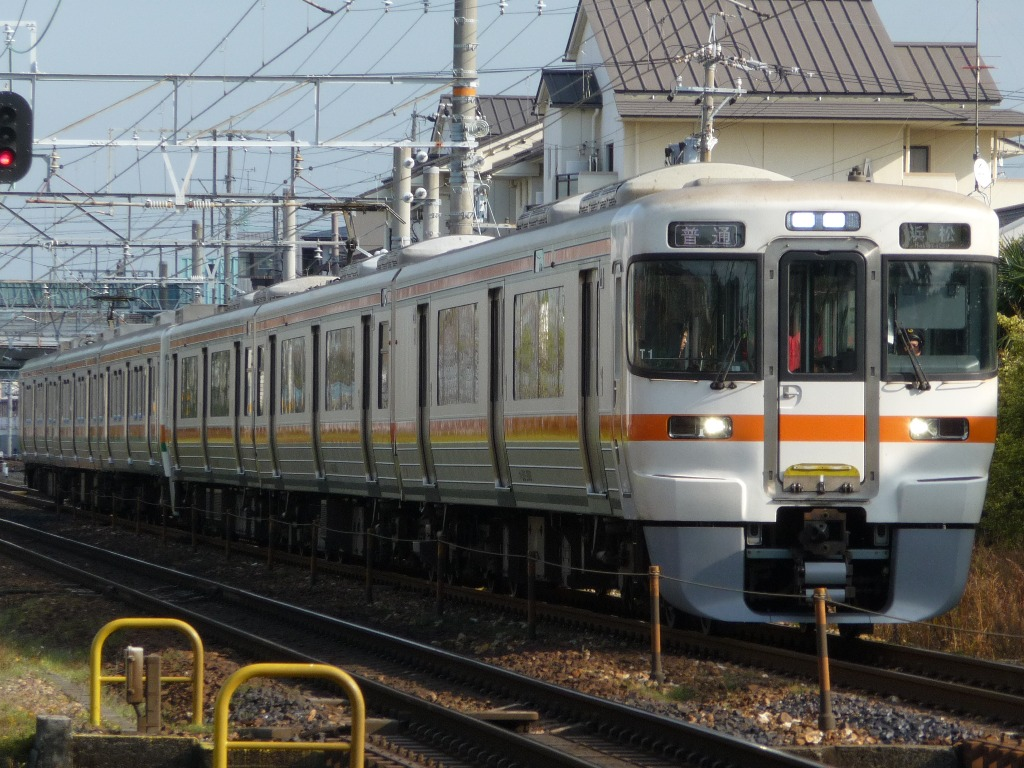 313系2500番代T1編成。211系との併結運用は日常的である。